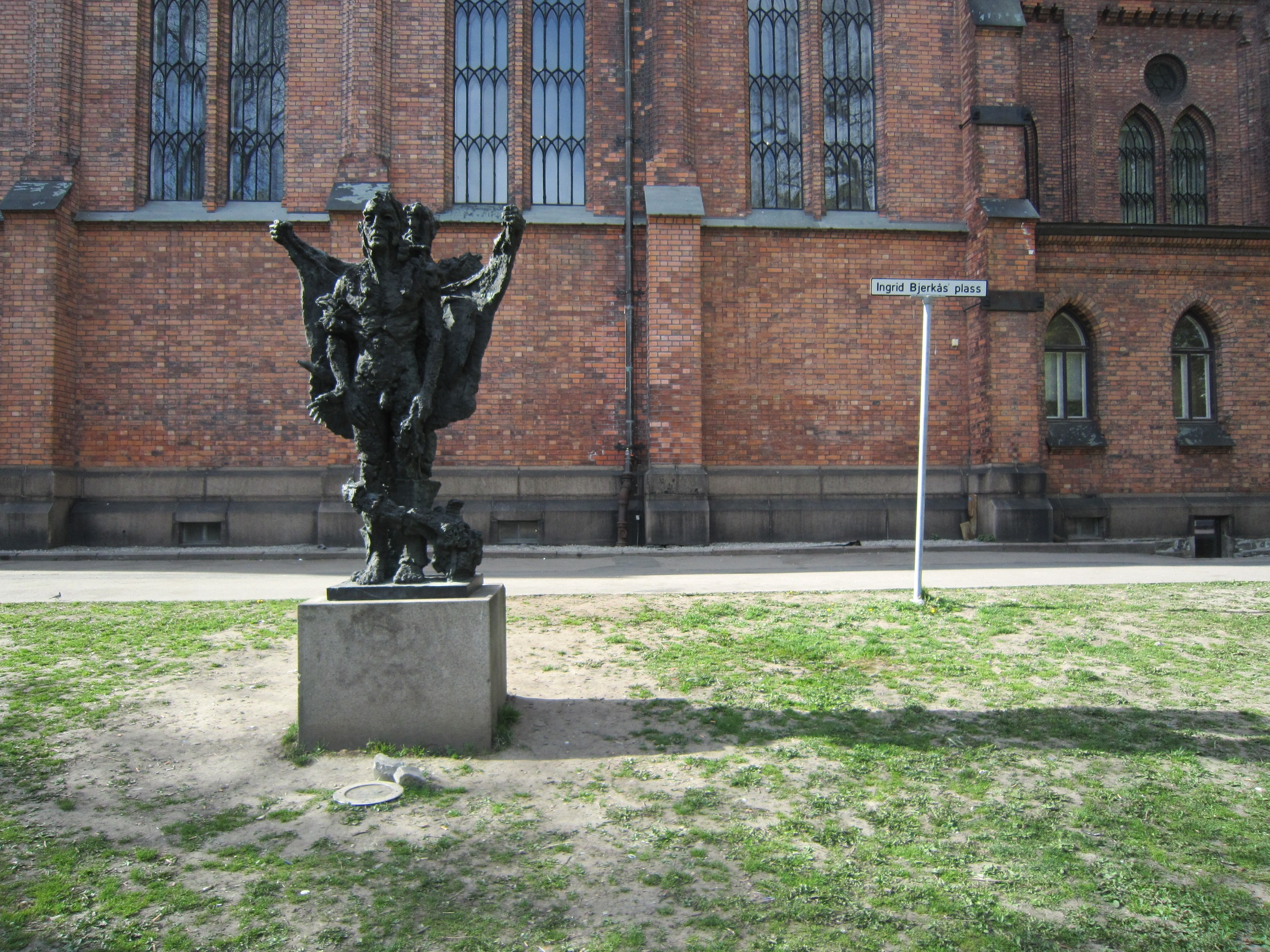 Statue og skilt ved Ingrid Bjerkås' plass, utenfor Jakob kirke